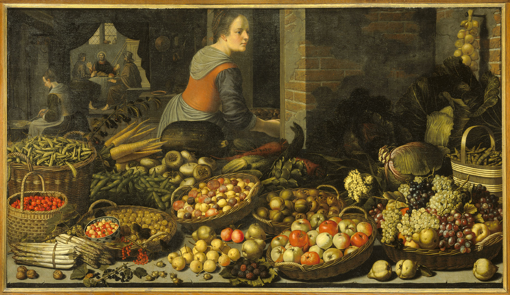 Stilleven met vruchten en groenten met op de achtergrond Christus en de Emmaüsgangers. ca. 1630. oil on canvasmedium QS:P186,Q296955;P186,Q4259259,P518,Q861259. Height: 113 cm (44.4 ″); Width: 200 cm (78.7 ″) dimensions QS:P2048,113U174728;P2049,200U174728. Amsterdam, Rijksmuseum Amsterdam.